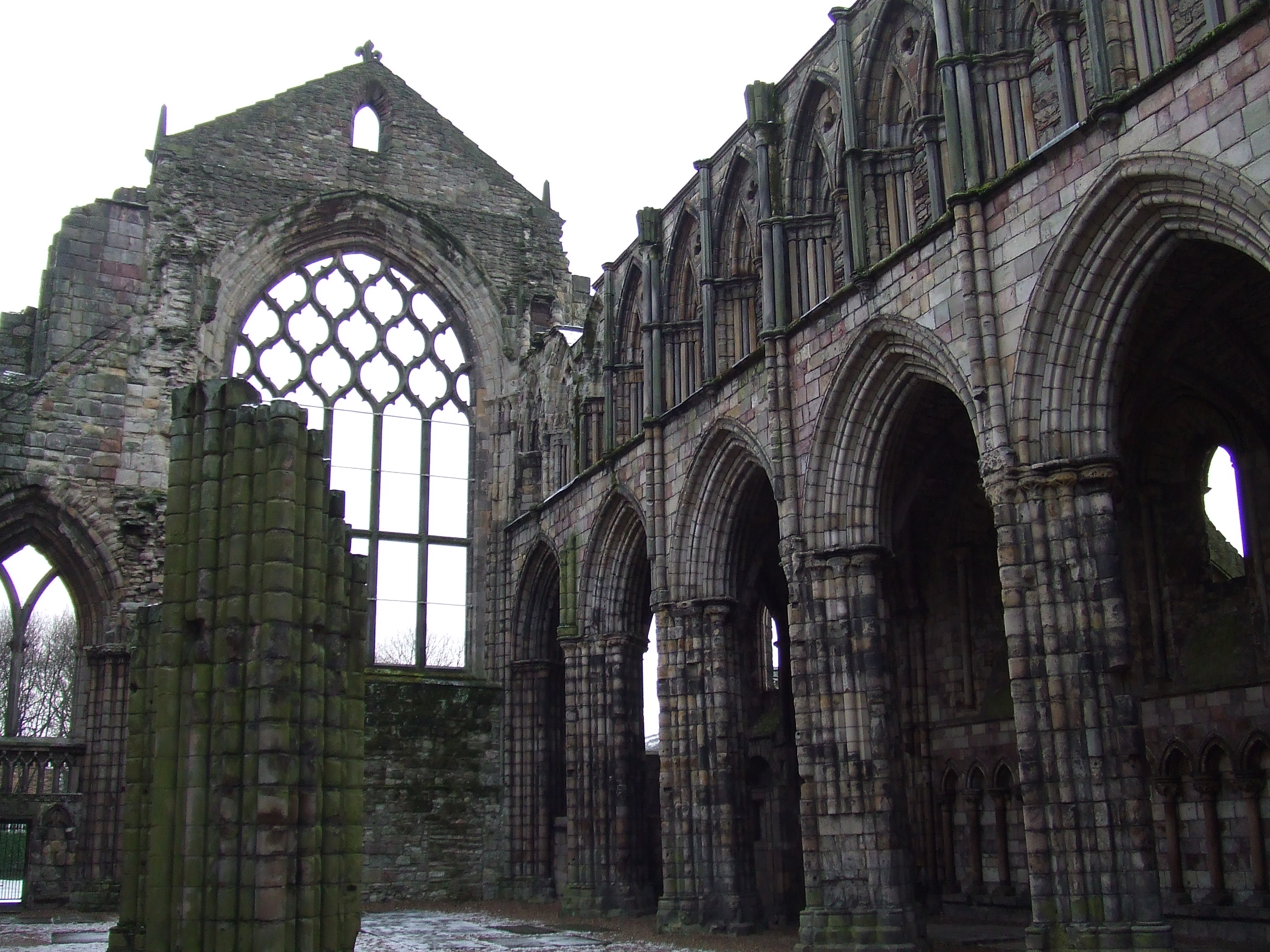 The ruins of Holyrood Abbey (Edimburgh)